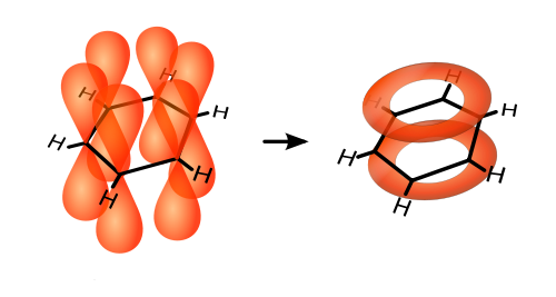 Benseen delokalisatsioon